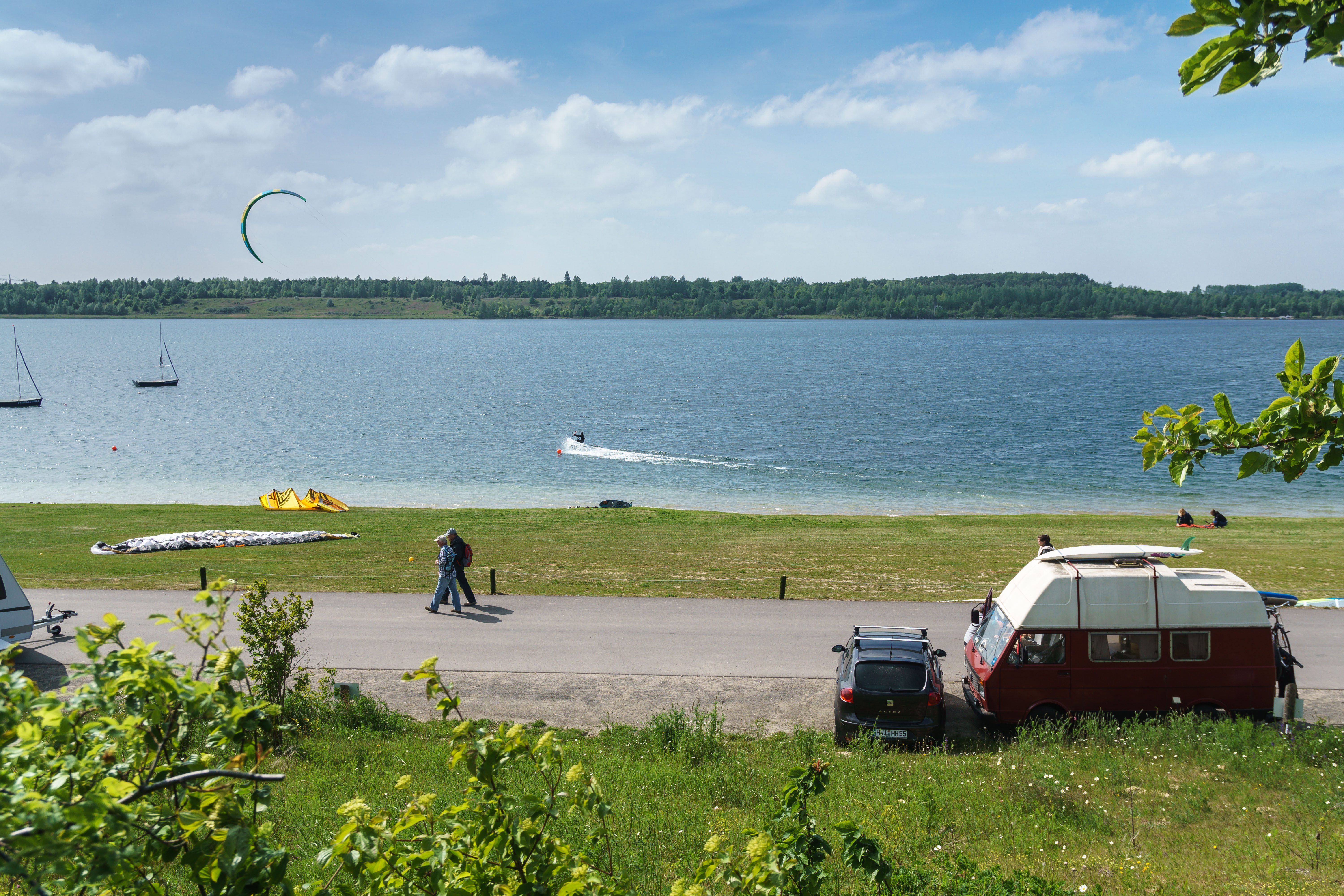 Kitesurfen am Schladitzer See in Rackwitz